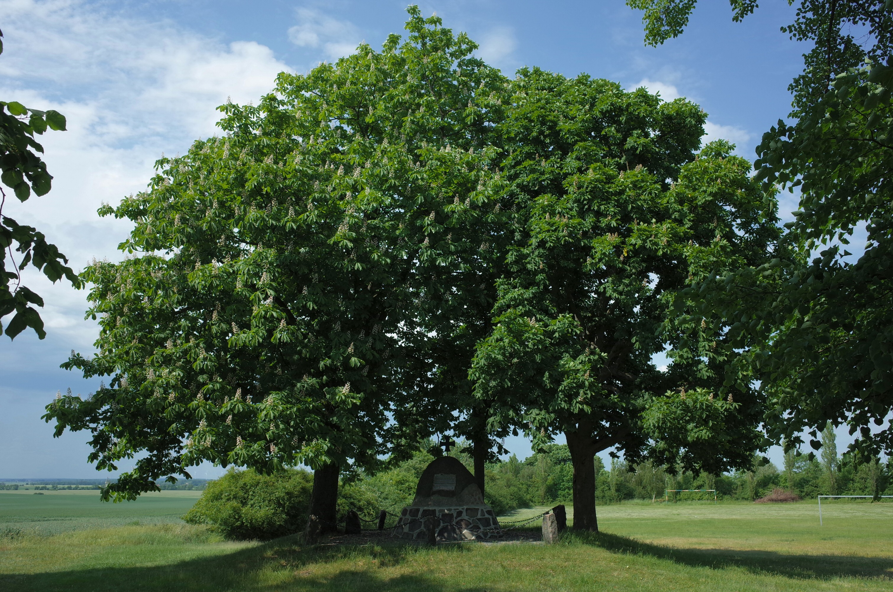 gommern, Ortsteil Ladeburg. Gedenkstein zur Erinnerung an den 5. April 1813.